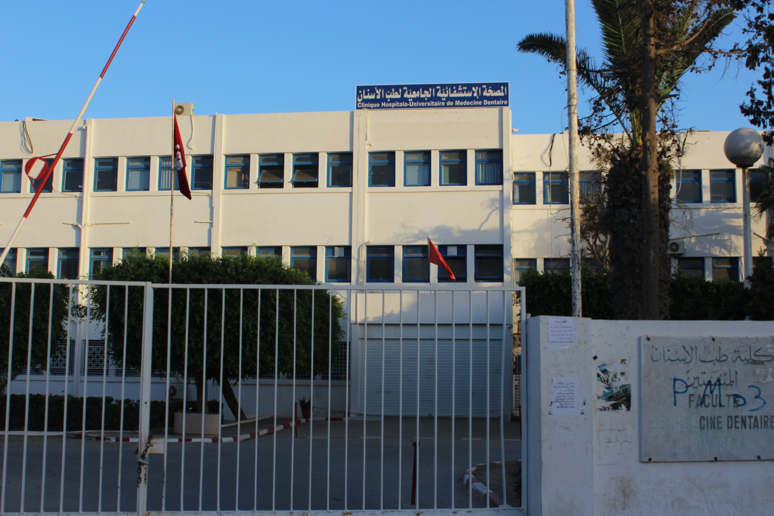 Monastir, Tunisie المنستير، تونس